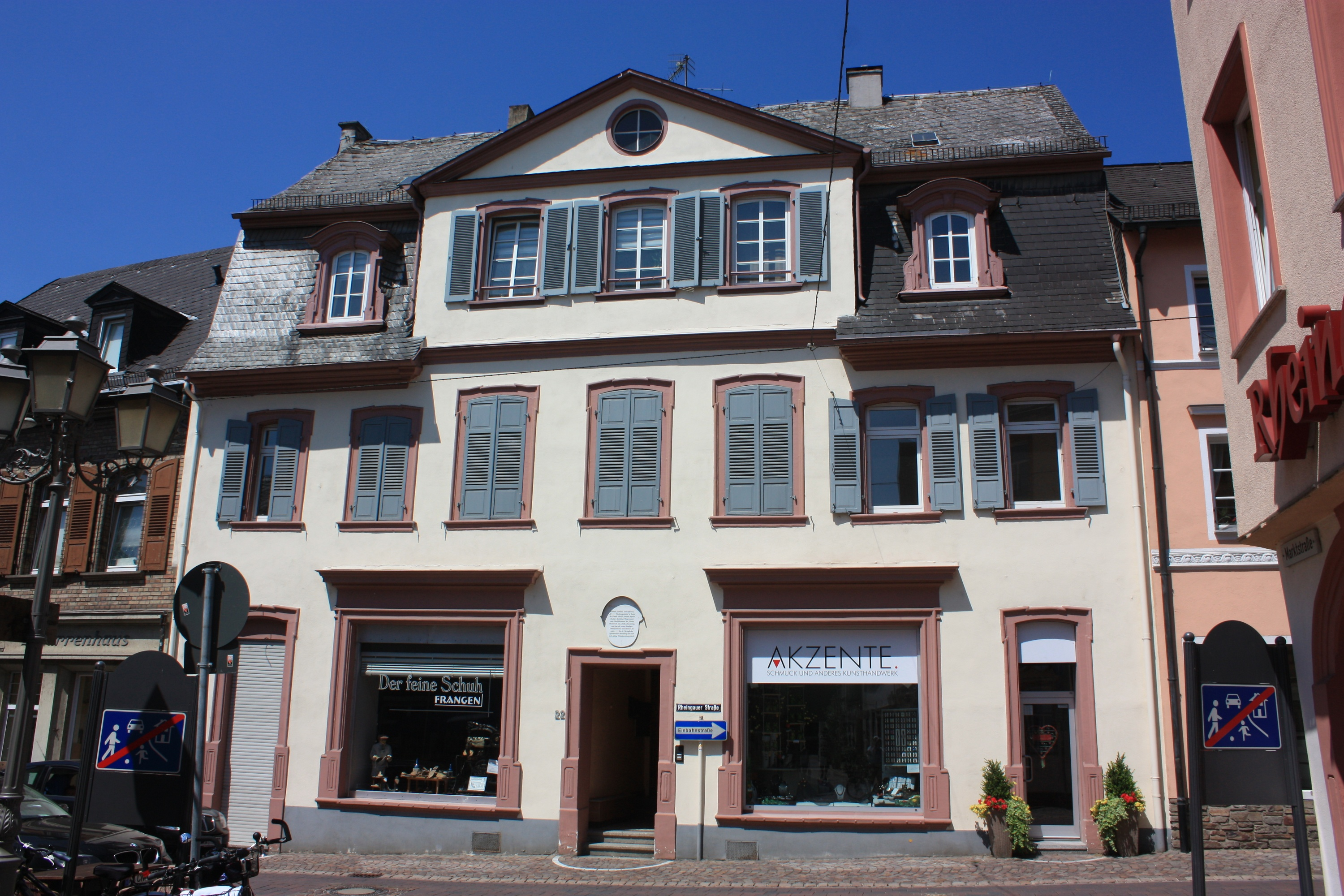 Eltville, Hessen: Morenapotheke, ehemals Nassauische Amtsapotheke